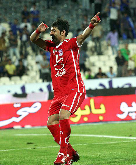 رقص لزگی بعد از هر گل